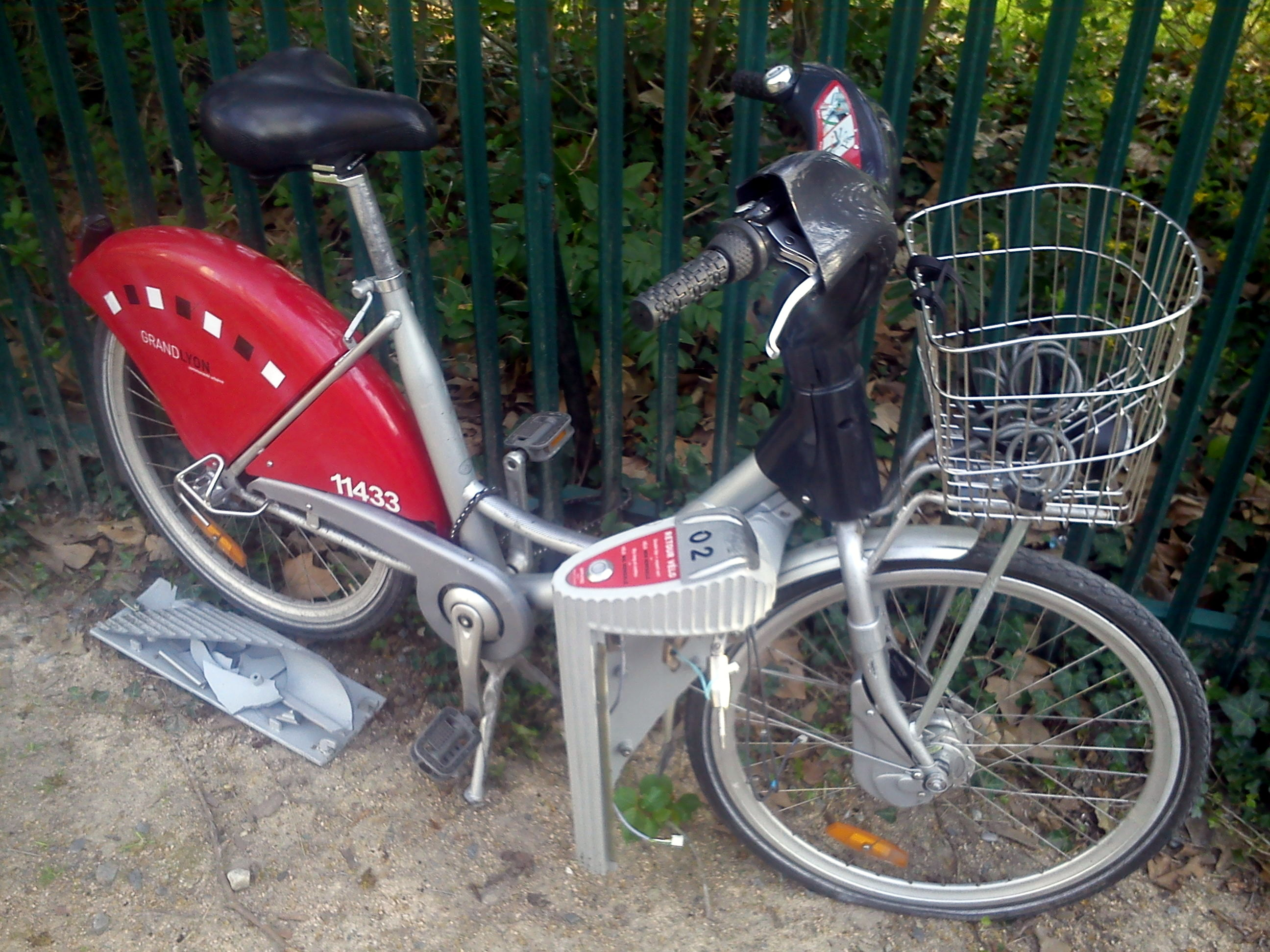 Une station de Velo'v détruite à Villeurbanne.